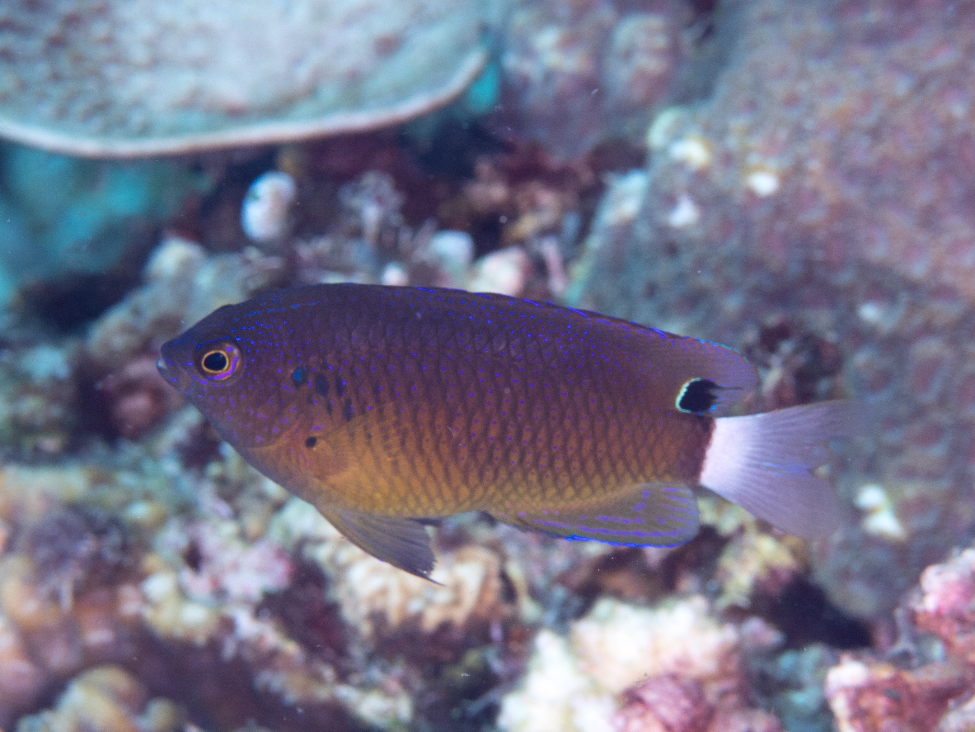 Lembeh, Indonesia - Speckled damsel (Pomacentrus bankanensis)